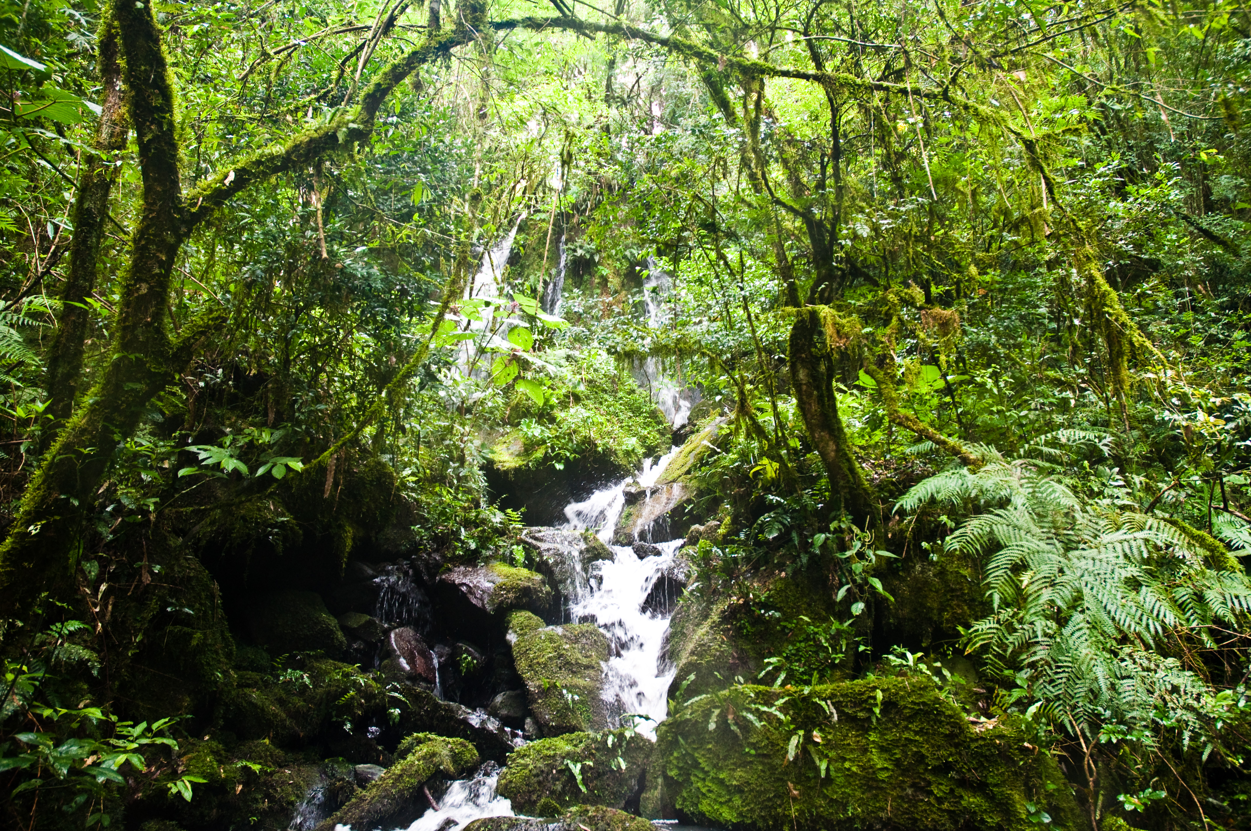 Reserva da Biosfera Yaboti, Argentina.